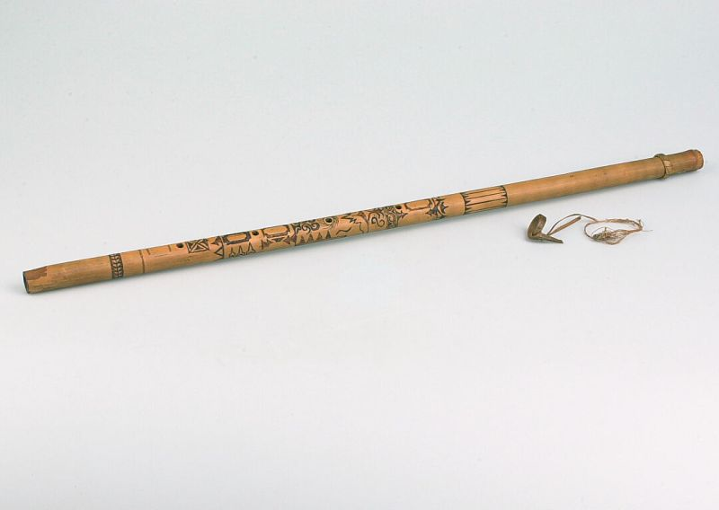 Blaasinstrument. Bandfluit van bamboe met vier vingergaten Unknown language: Suling